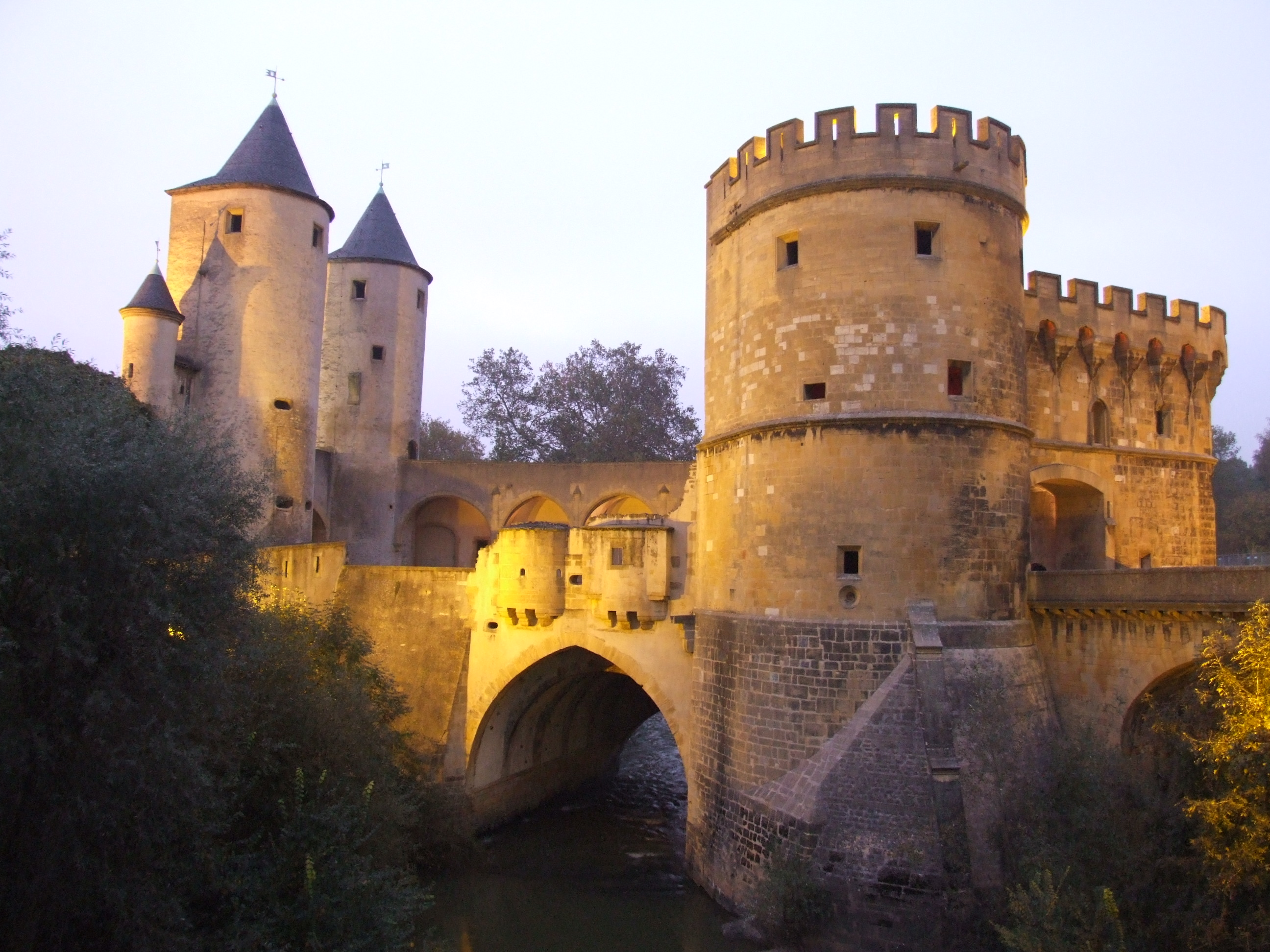 Portes des Allemands, Metz, FRANCE